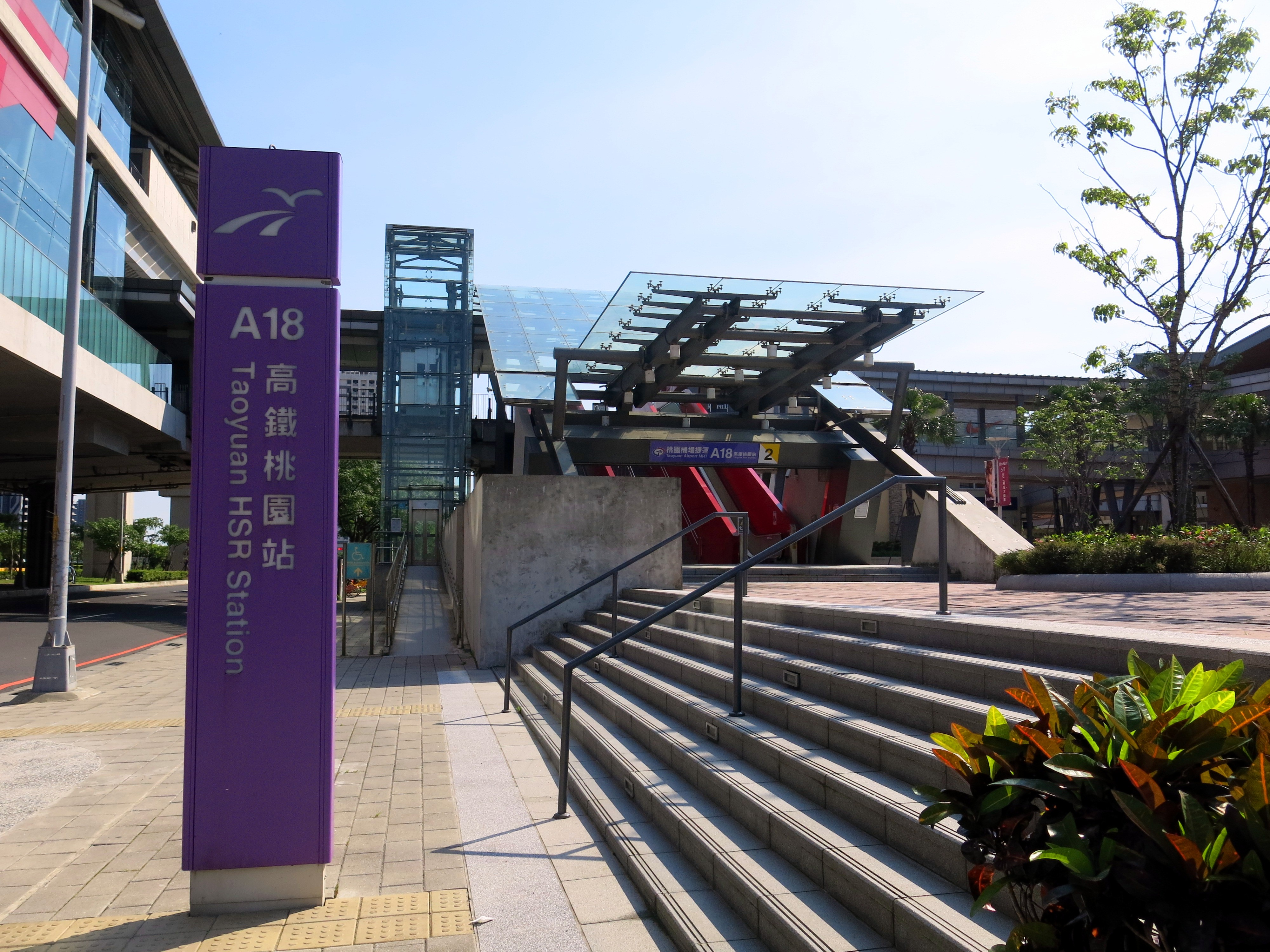 中文（台灣）: 桃園捷運機場線A18高鐵桃園站